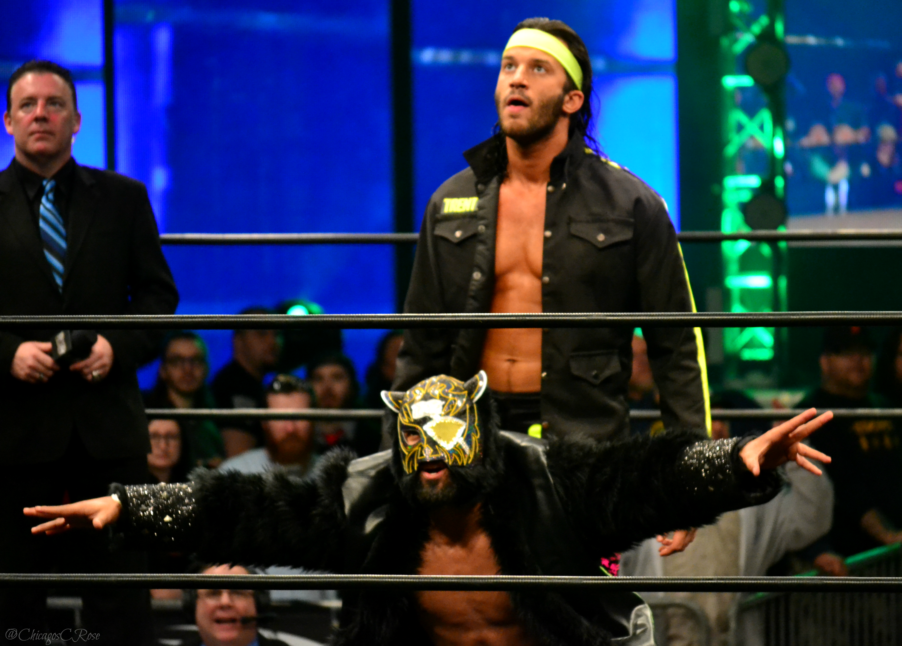 Barreta (debout) et Rocky Romero (masqué à croupis)